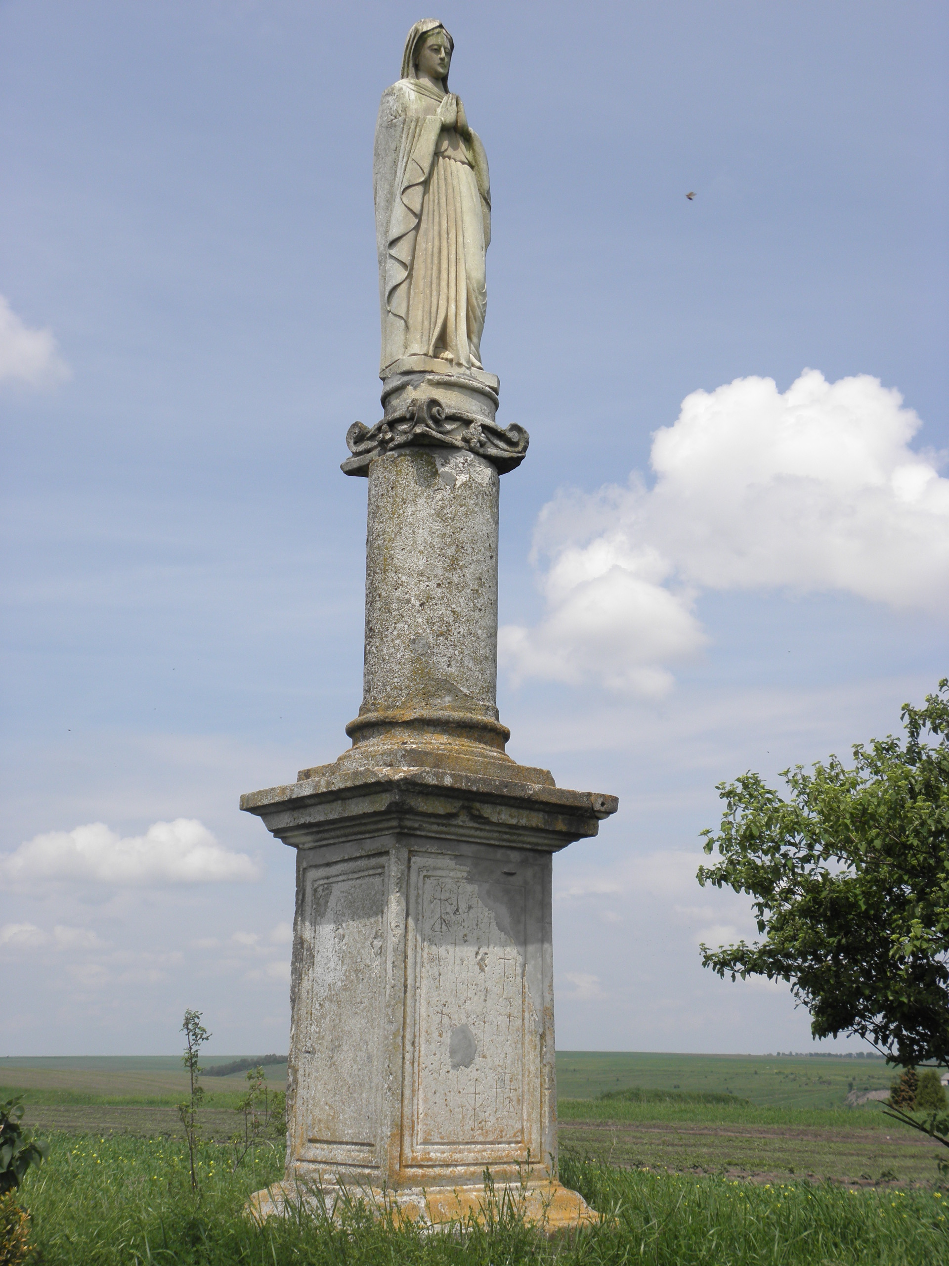 Figurka Św. Anny w Podhajcach w miejscu bitwy Jan III Sobieskiego z Tatarami 6-16 października 1667. Postawiona w 1883 - w 200 rocznicę bitwy pod Wiedniem, zburzona w 1944, odnowiona z ocalałych resztek w 1991